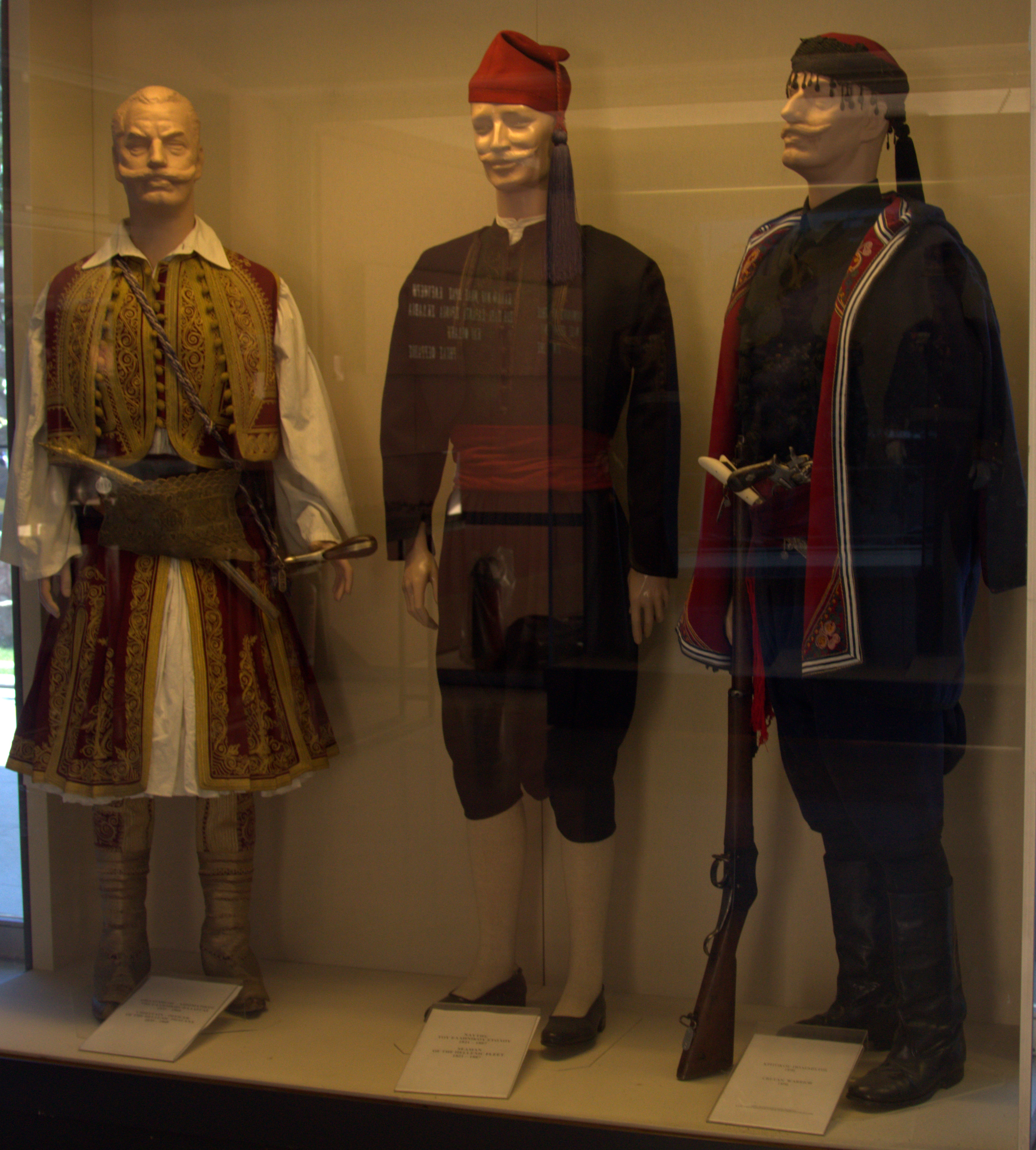 1. Chieftain - Officer of the Hellenic Phalanx, 1835-1868 2. Seaman of the Hellenic fleet, 1821-1887 3. Cretan warrior, 1896 --- 1. Οπλαρχηγός - Αξιωματικός της Ελληνική Φάλαγγας, 1835-1868 2. Ναύτης του Ελληνικού στόλου, 1821-1887 3. Κρητικός πολεμιστής, 1896 Πολεμικό Μουσείο Ελλάδος. Αθήνα.